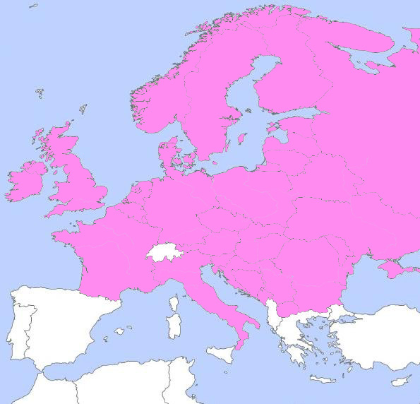 Распространение сурепки сжатой Barbarea stricta в Европе